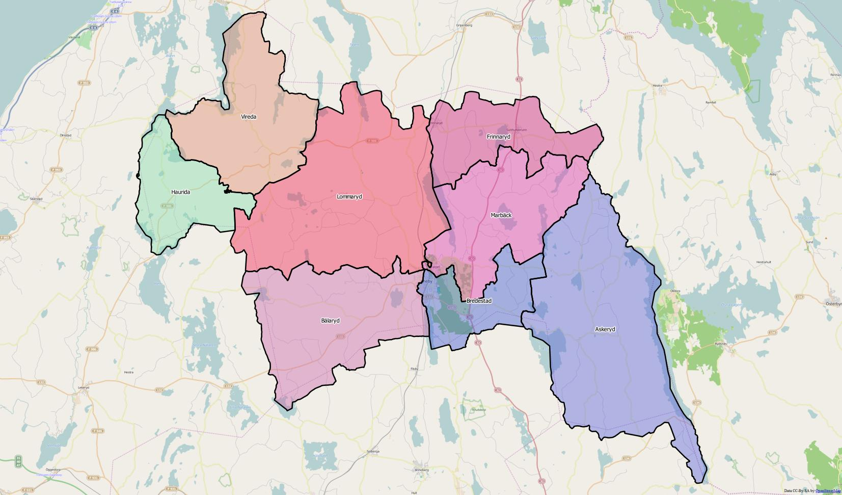 Distriktsindelningen i Aneby kommun